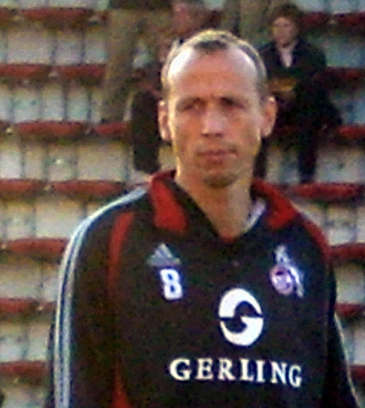 Matthias Scherz, 1.FC Köln